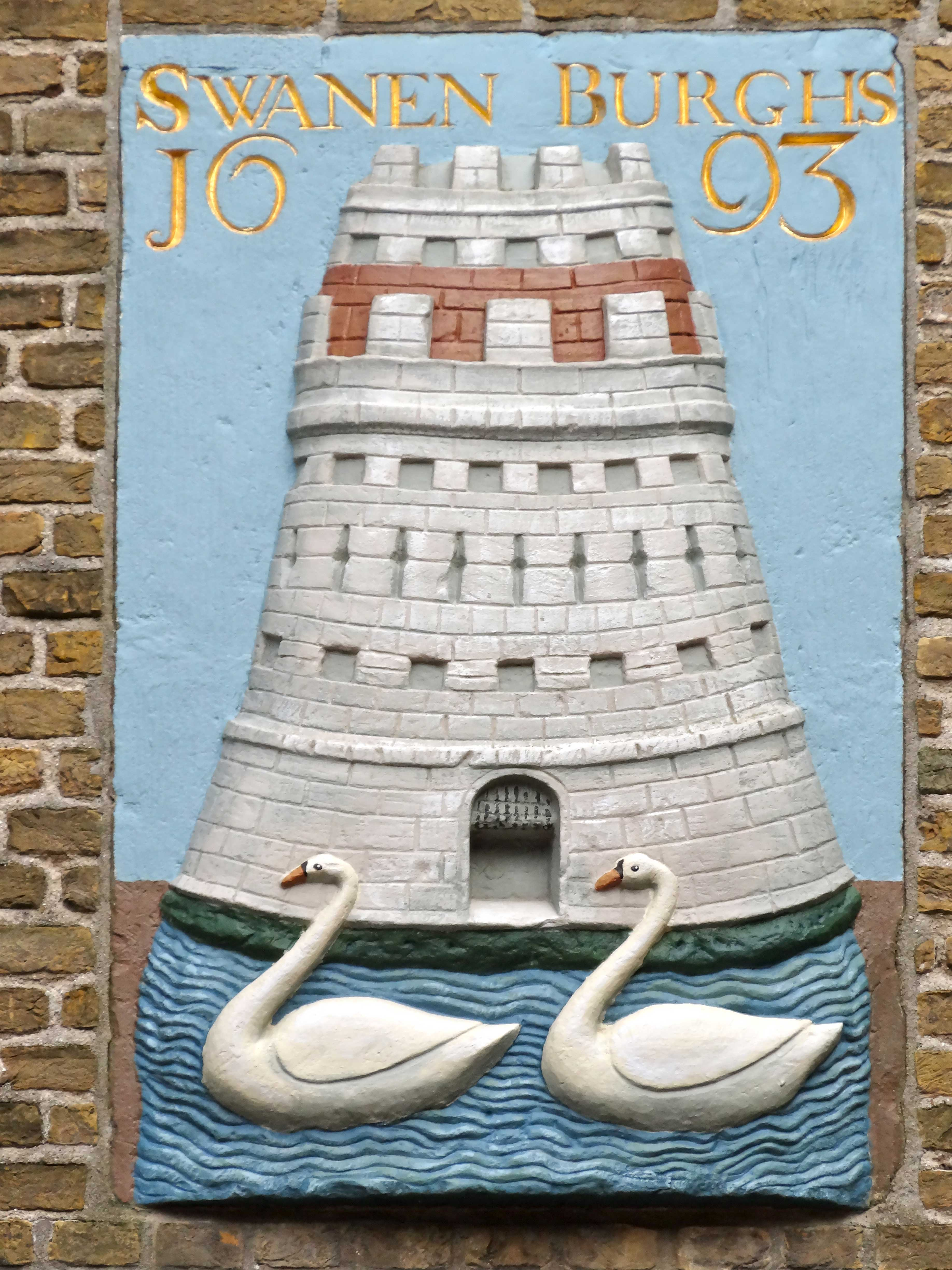 Reliëf Swanenburghs Hofje uit 1693 - Catharijnatuin Achter de Kerk Gouda